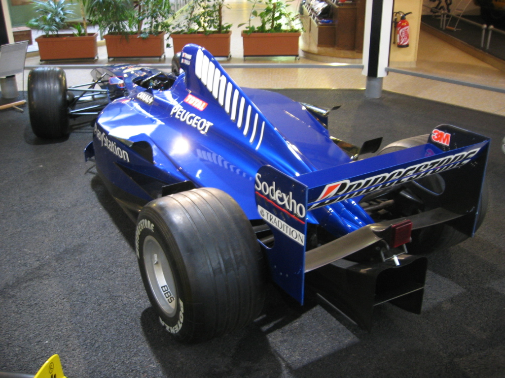 Formule 1 Prost Grand Prix - Musée Peugeot Sochaux